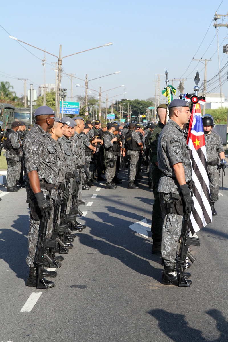 Desgile de 7 de Setembro de 2014